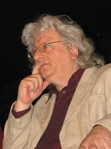 Péter Esterházy (b. 1950), Hungarian writer